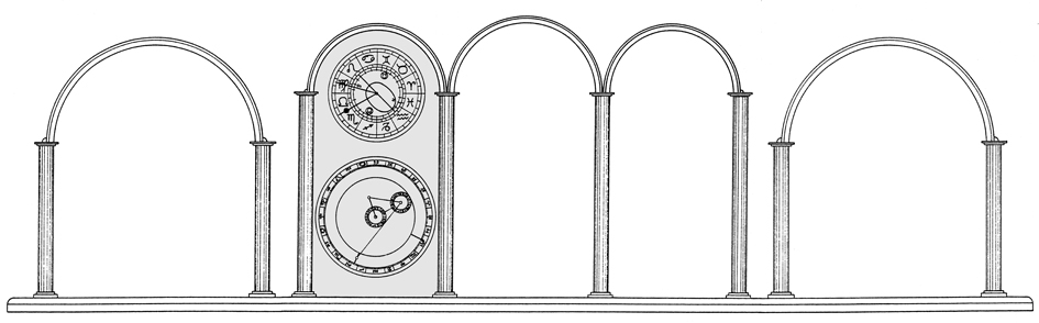 Tellurium der großen astronomischen Uhr, Hans Lang, Essen, 1982-1986